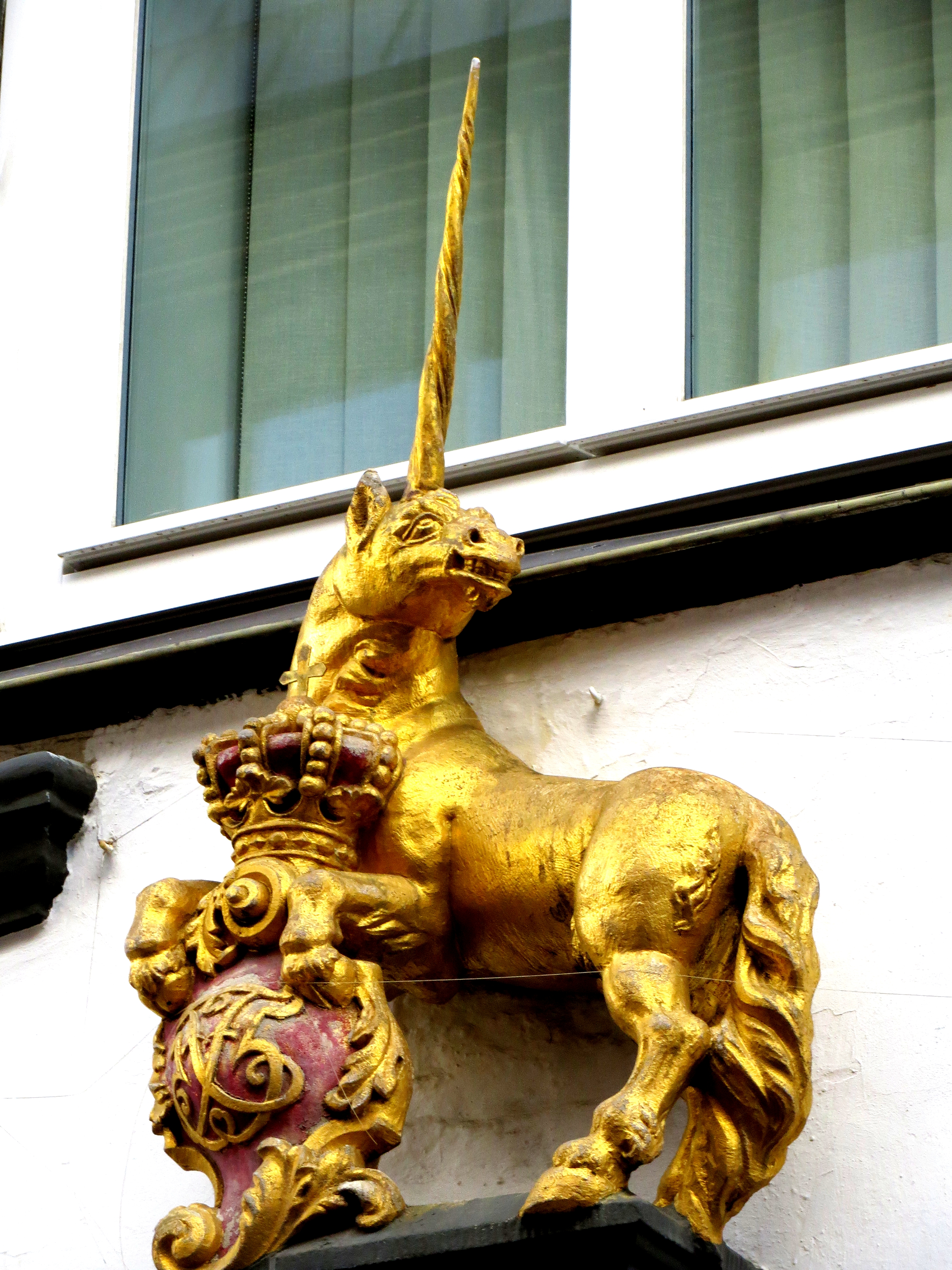 Einhorn vom Portal der Ratsapotheke, Holm 13, Flensburg, die durchgehend farbige Kopie, Original um 1745-66 im Museum, Heinrich-Sauermann-Haus, Bild 2}; Mit Monogramm von Friedrich V.